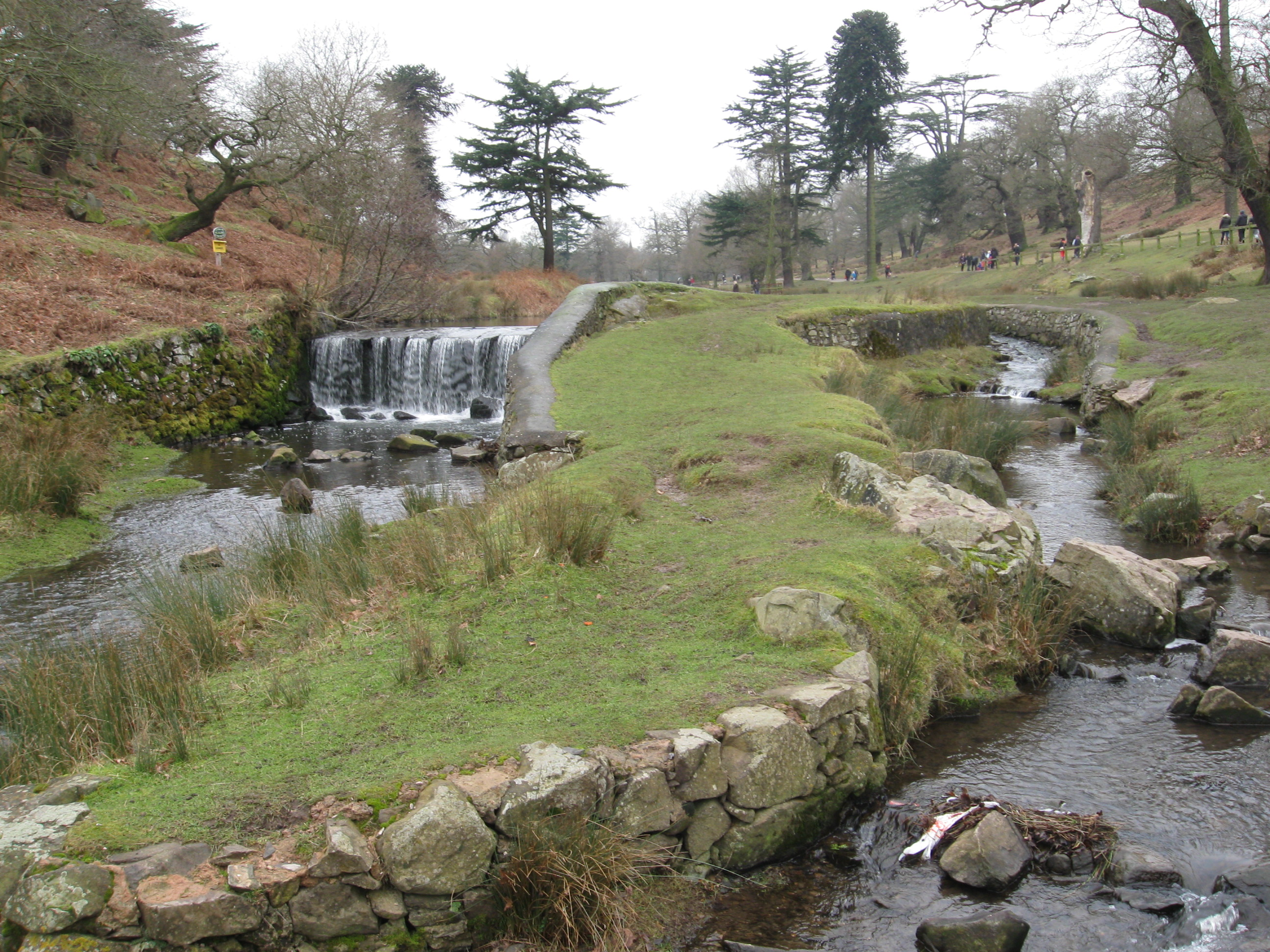 Rzeka Lin